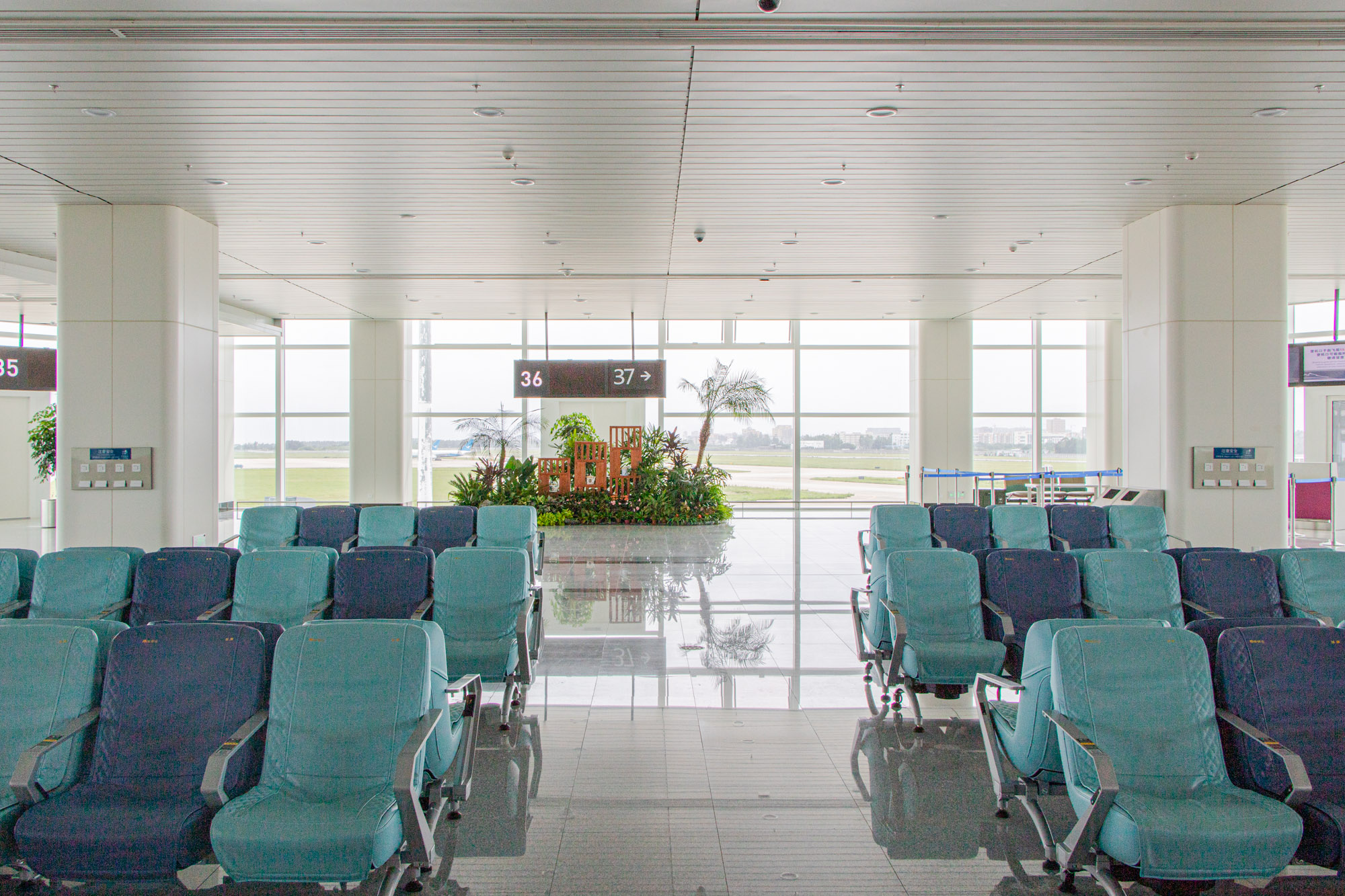 中文（中国大陆）: 福州长乐国际机场新建南指廊国际候机厅